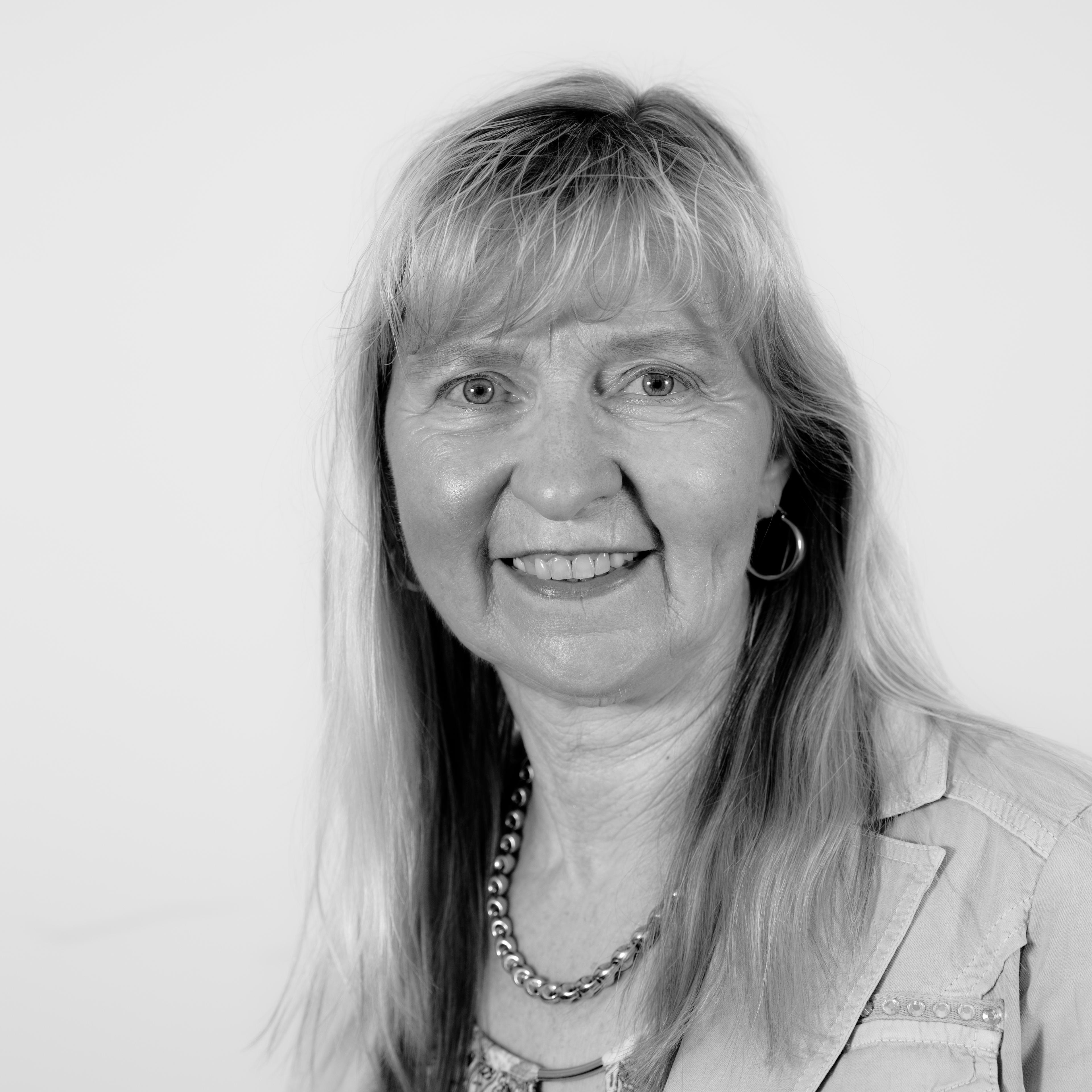 Die saarländische Landtagsabgeordnete Astrid Schramm